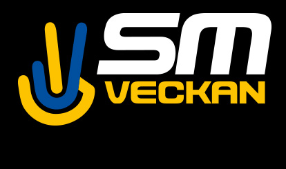 Officiella loggan för Sm-veckan